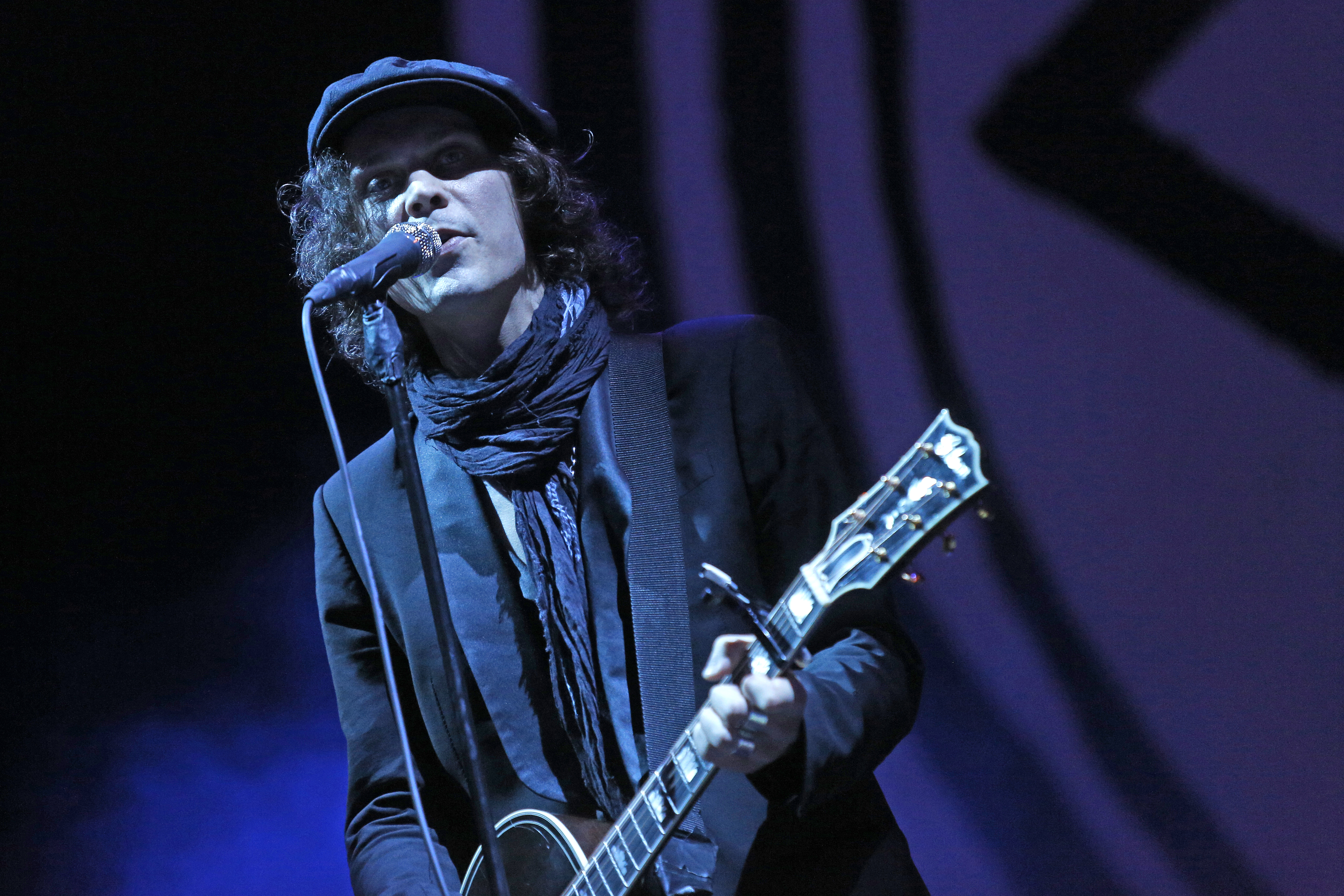 Ville Valo, Sänger und Gitarrist der Band HIM, steht beim Nova Rock-Festival 2013 auf der "Blue Stage"